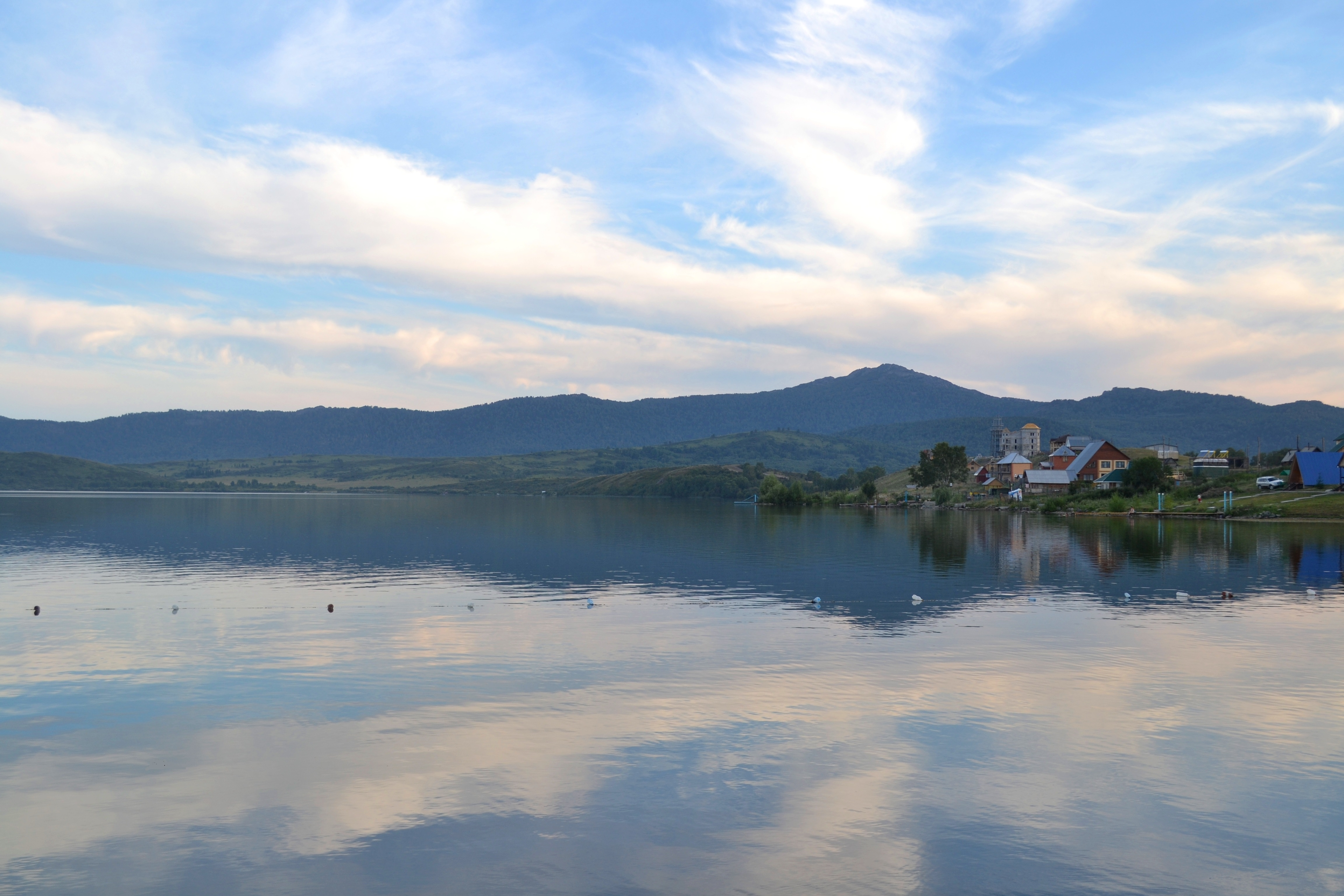 Белое озеро, Курьинский район This image is related to the protected area of Russia number 2210114